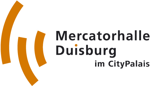 Firmenlogo der Mercatorhalle Duisburg